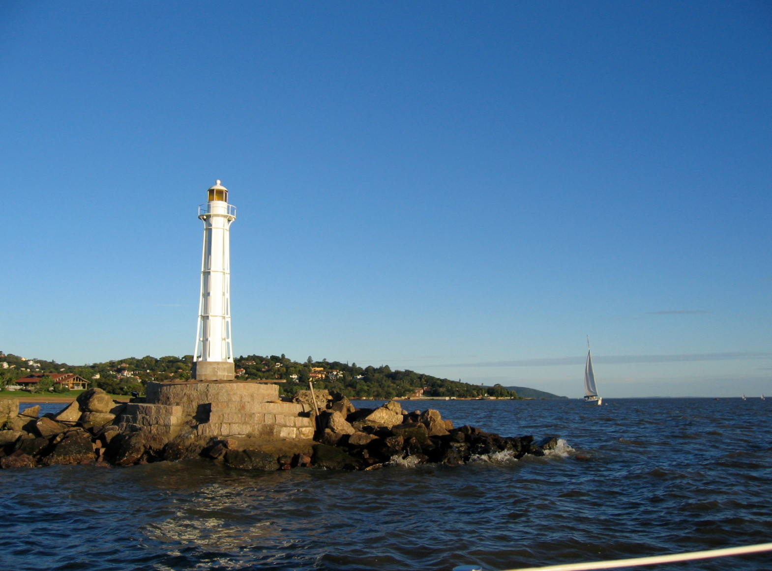 O farol da Ilha do Clube dos Jangandeiros no bairro Tristeza, Porto Alegre, Brasil. Localização possivel (30° 6.568'S 51° 15.903'W )